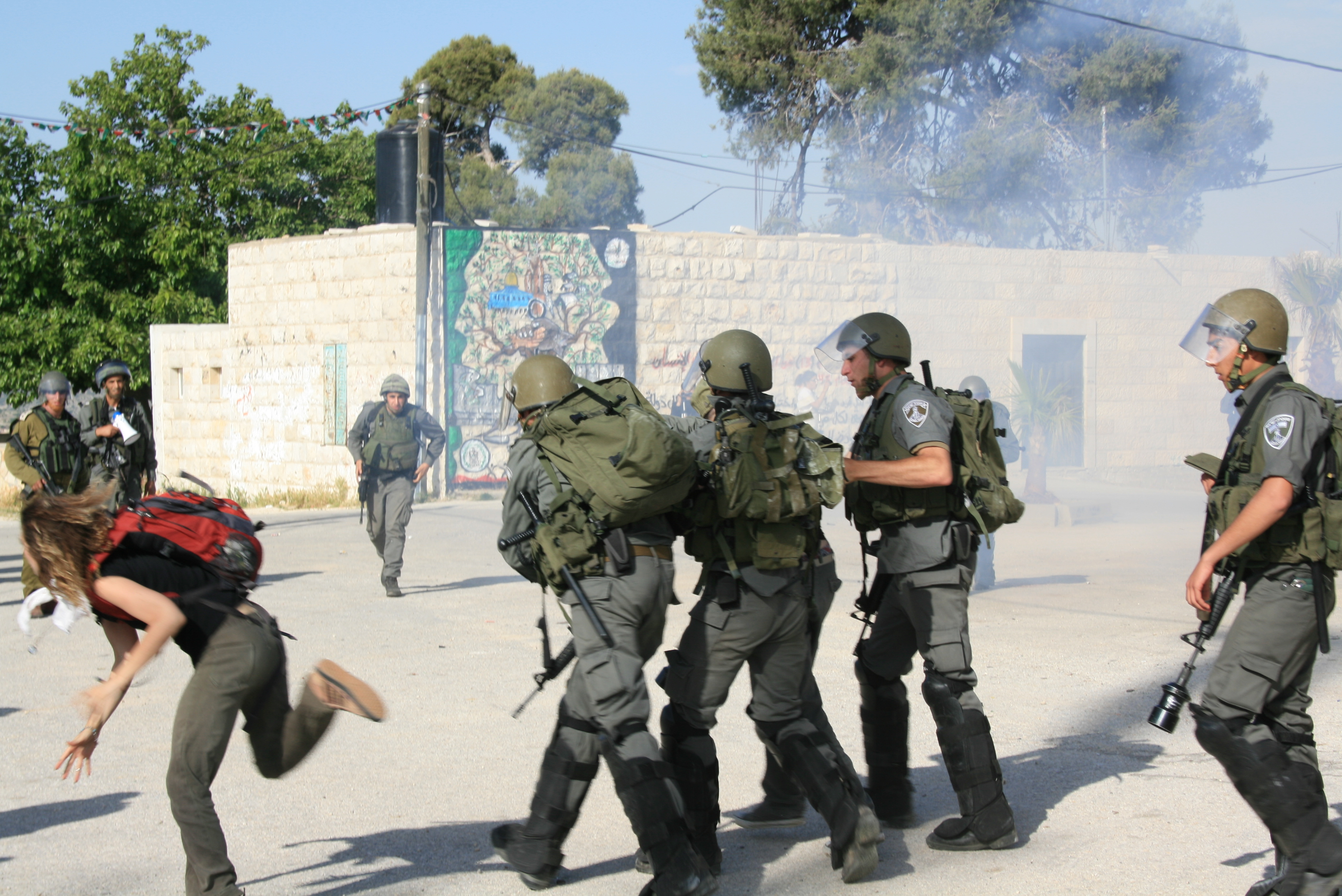 שוטרי משמר הגבול בעימות עם מפגינים בנבי סאלח, מאי 2011